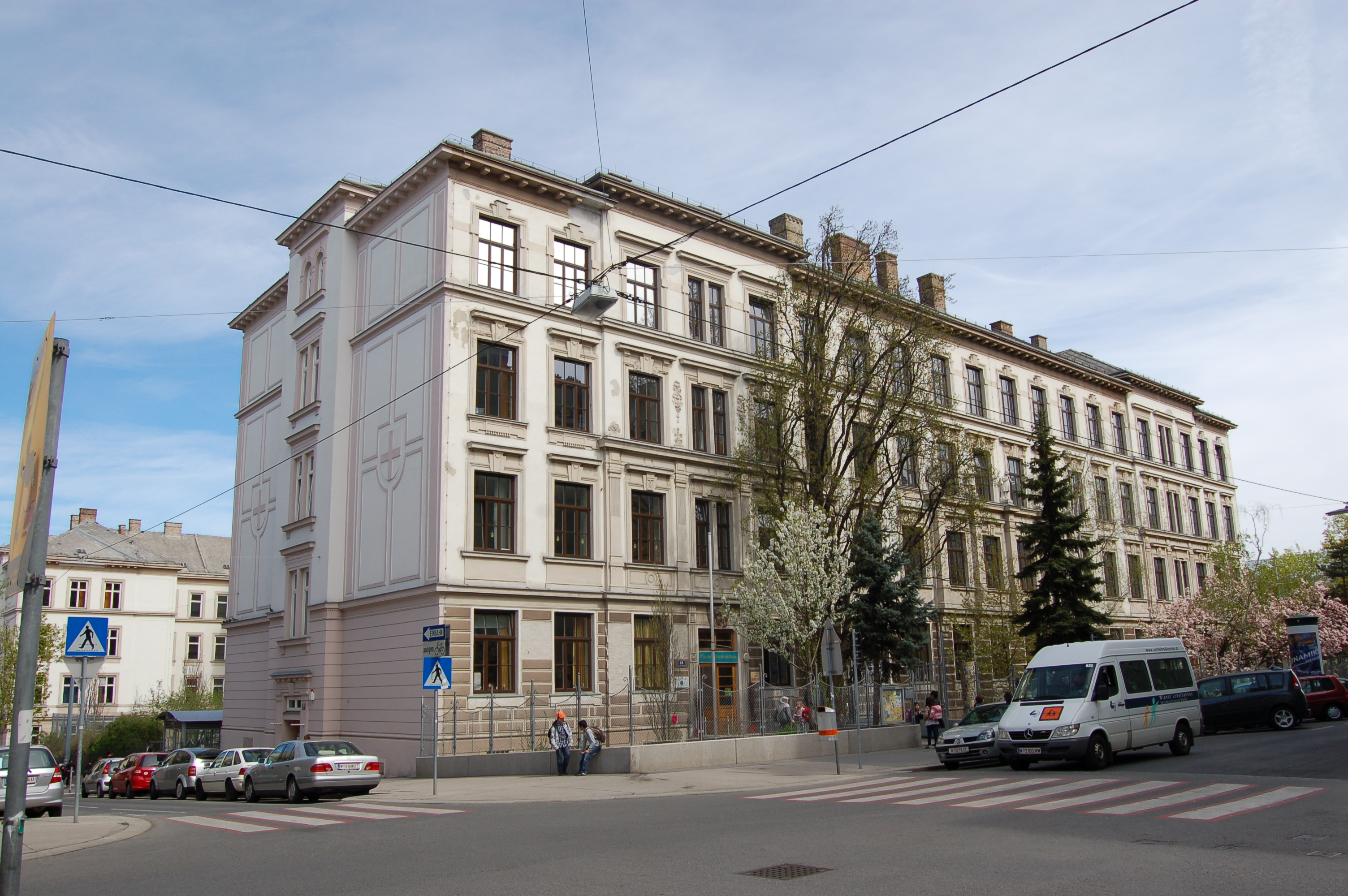 Die Marie-Jahoda-Schule in der Herbststraße 86 in Wien-Ottakring.